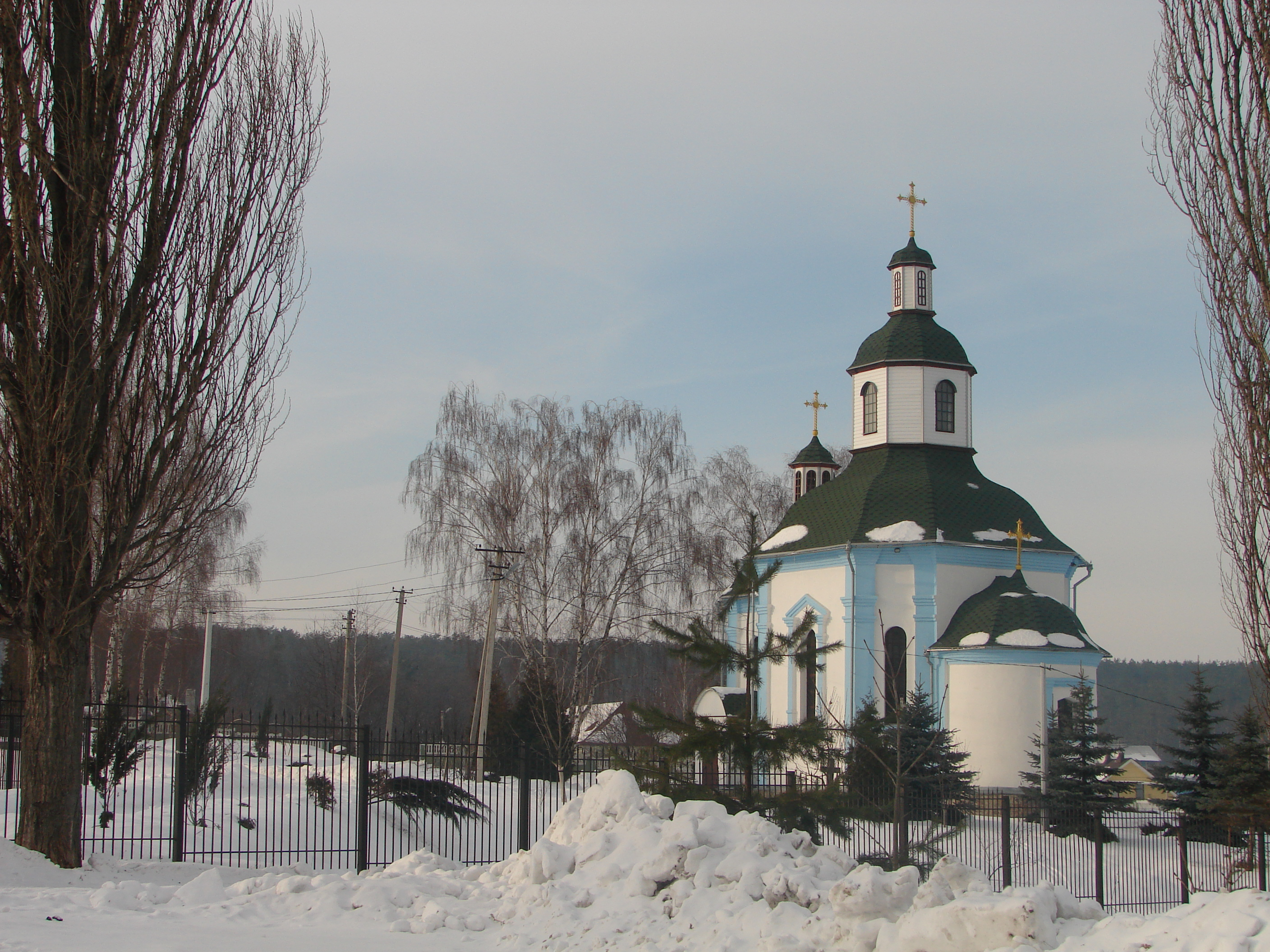 Церква Різдва Пресвятої Богородиці у с. Віта-Поштова (Києво-Святошинський р-н, Київська область, Україна)